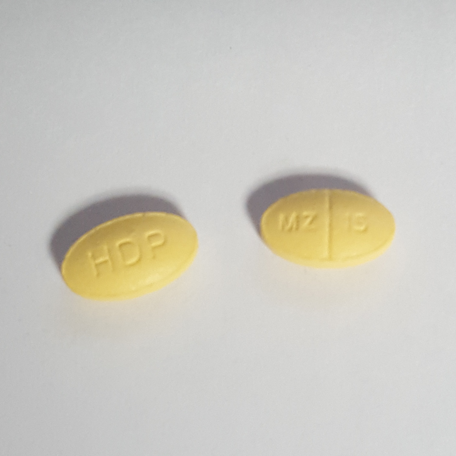 미르타자핀 '레메론' 제네릭 (현대약품)